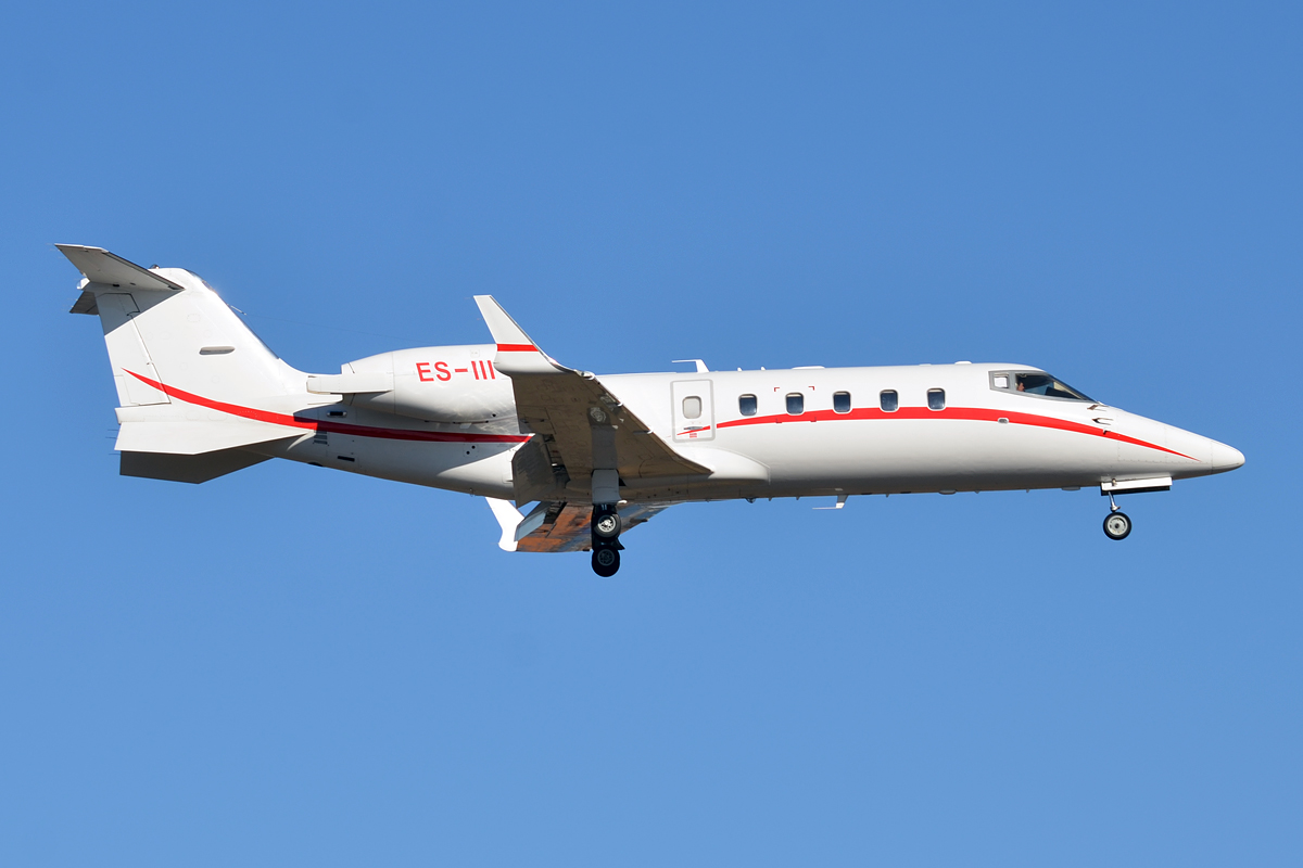 Panaviatic, ES-III, Learjet 60